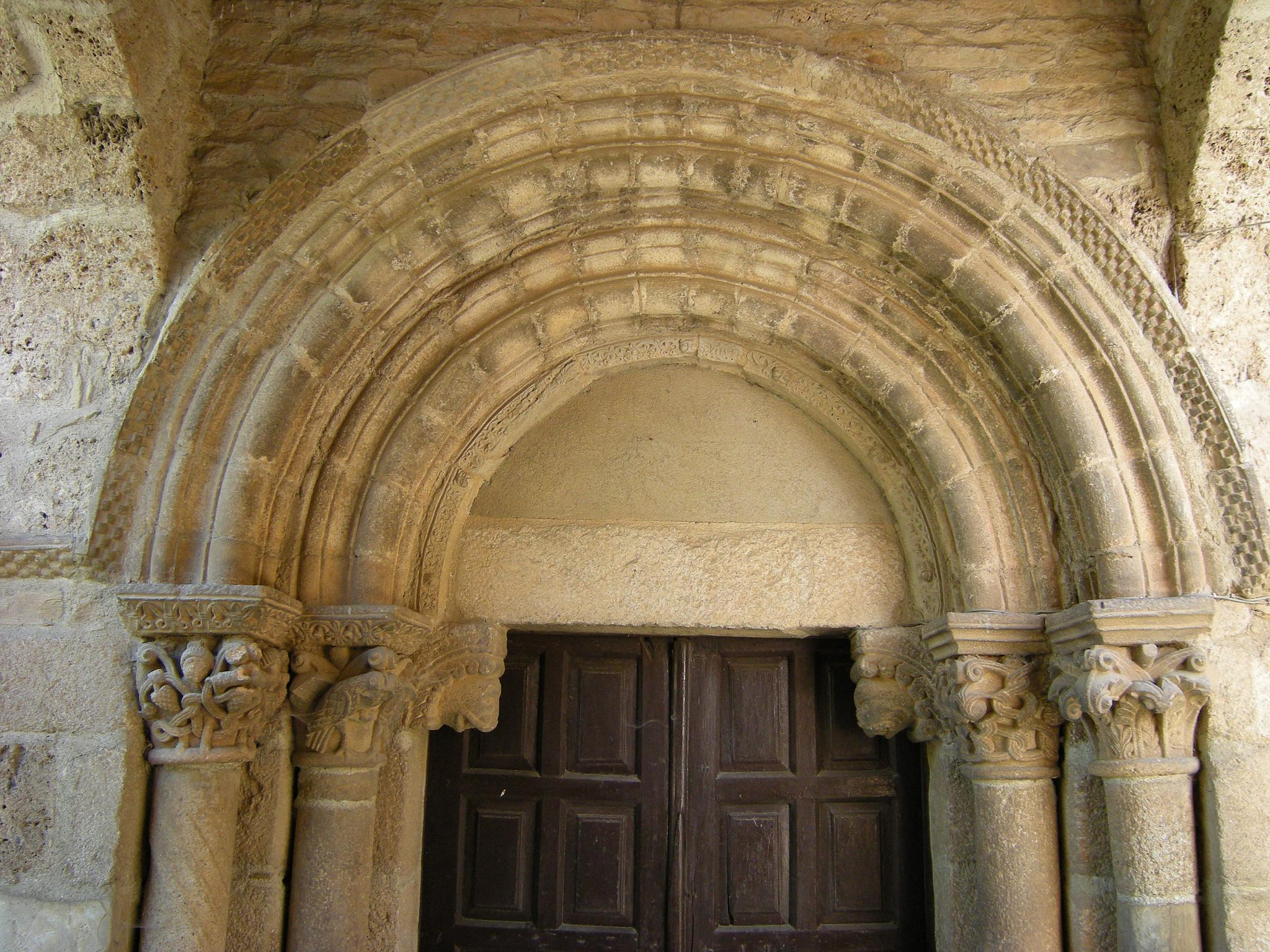 Iglesia de San Esteban de Corullón